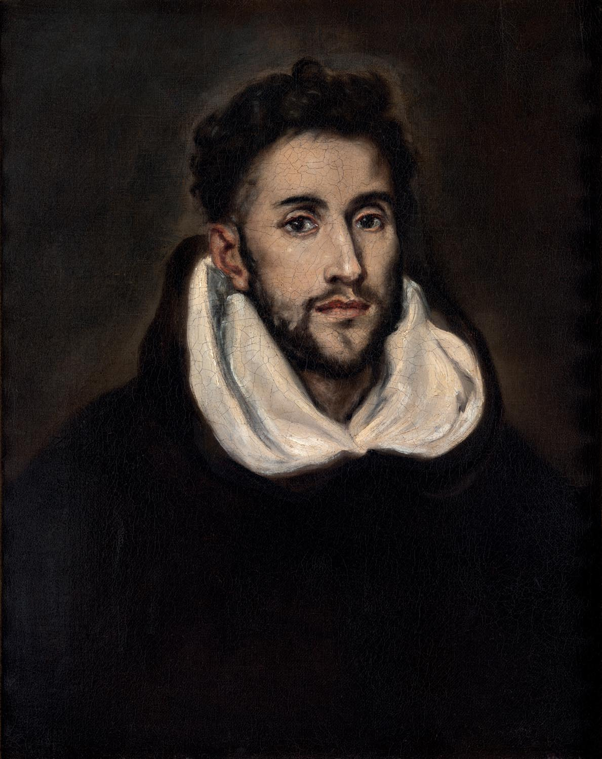 Retrato del poeta y religioso Hortensio Félix Paravicino (1580-1633), que fue monje de la Orden Trinitaria.